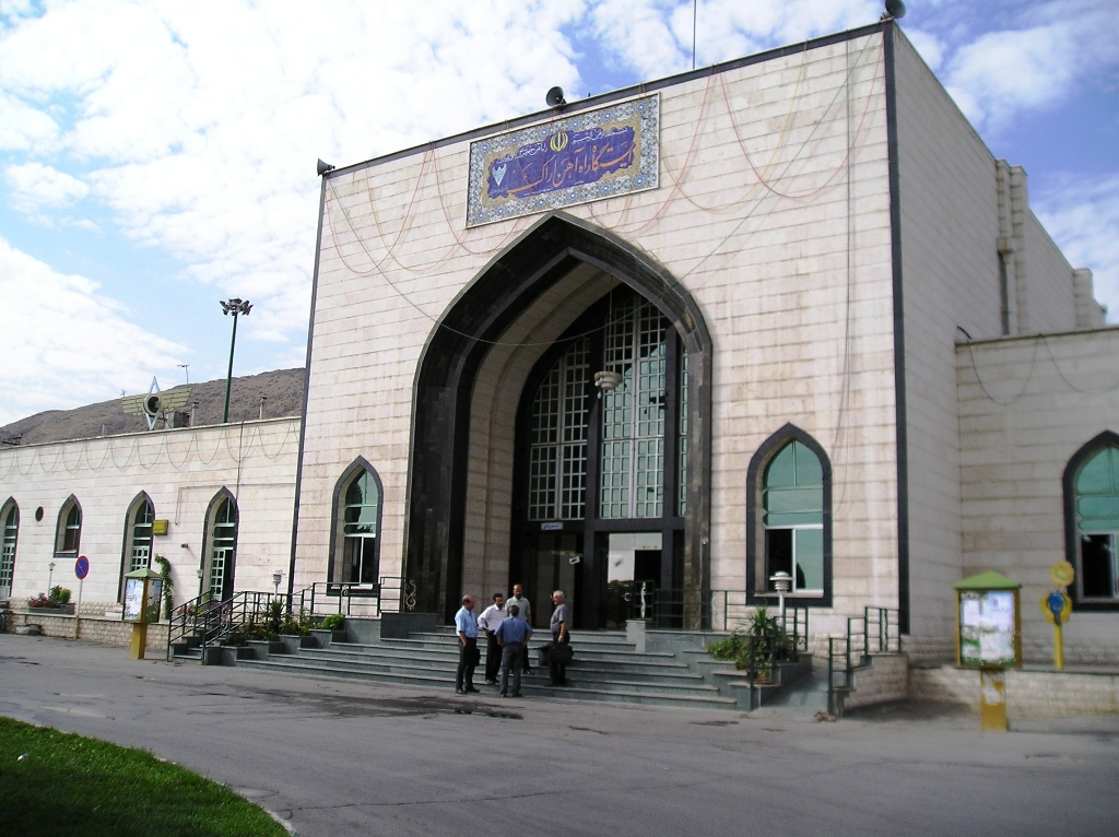 Arak Bahnhof